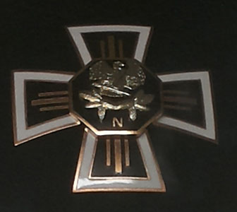 Nõmme Kaitseliidu teenetemärk Nõmme Rist.